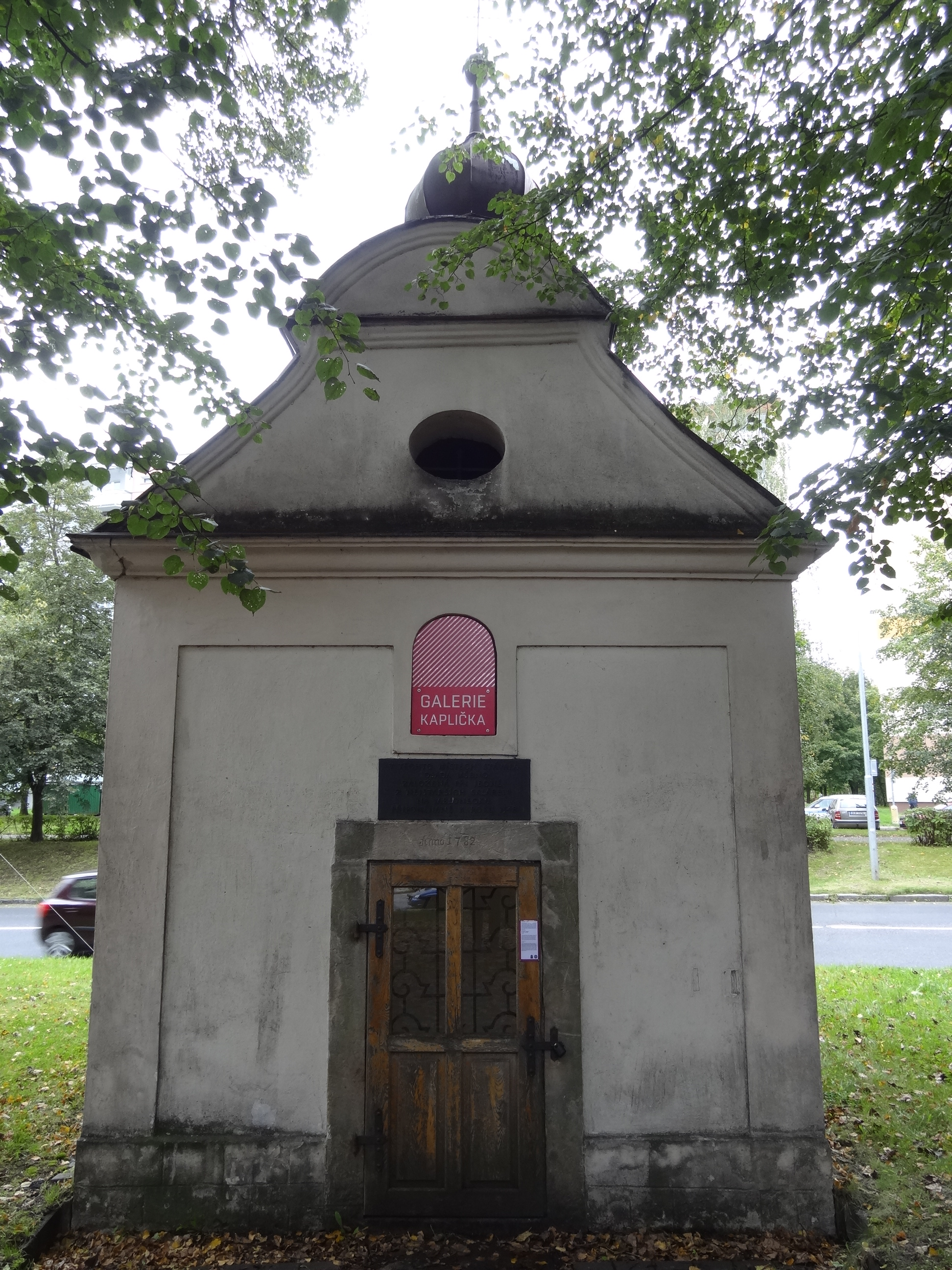 Barokní kaple svaté Anny vystavěná pravděpodobně mezi lety 1780-1782, Mšeno nad Nisou.